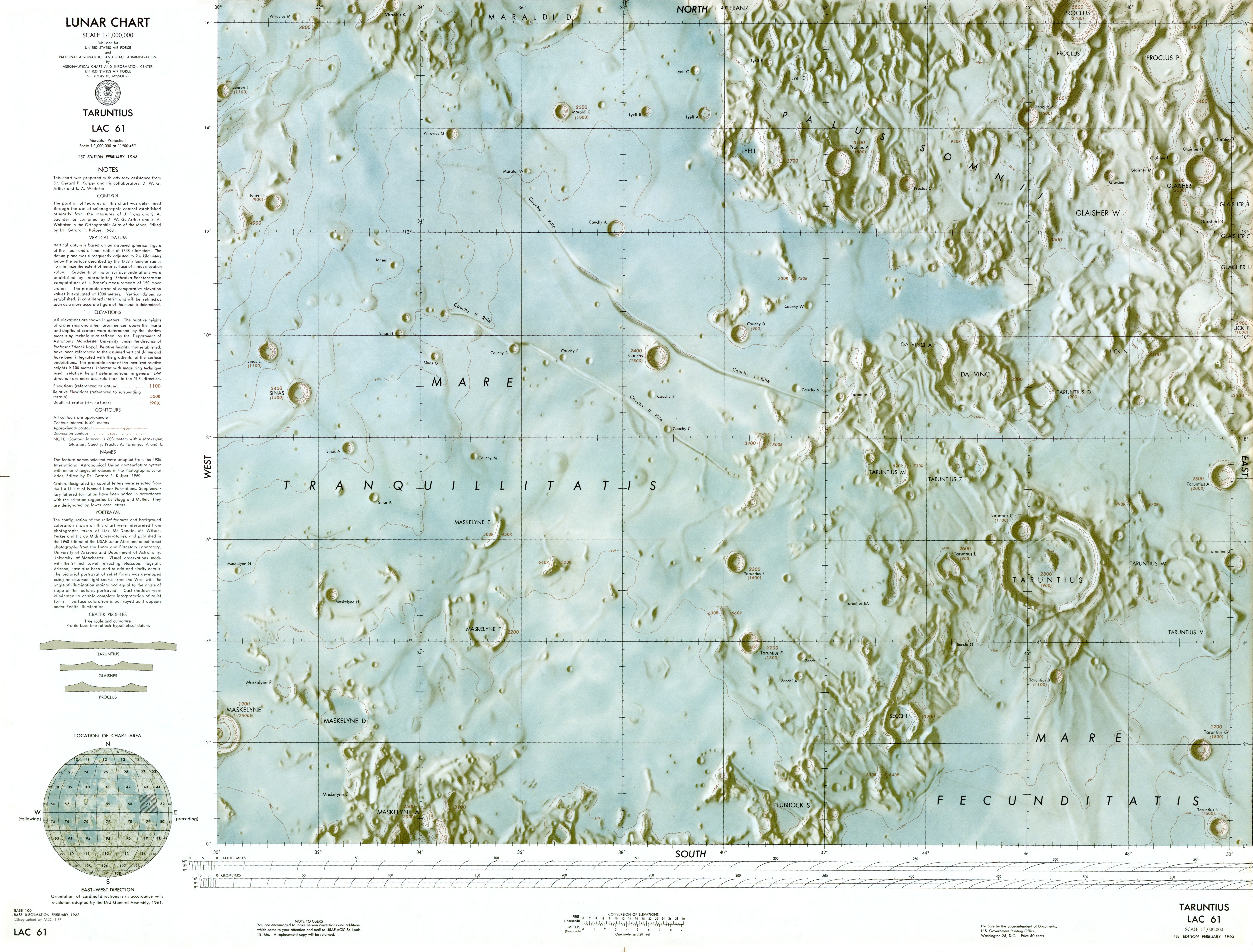 1:000 000 scale lunar chart - Taruntius (LAC 61)